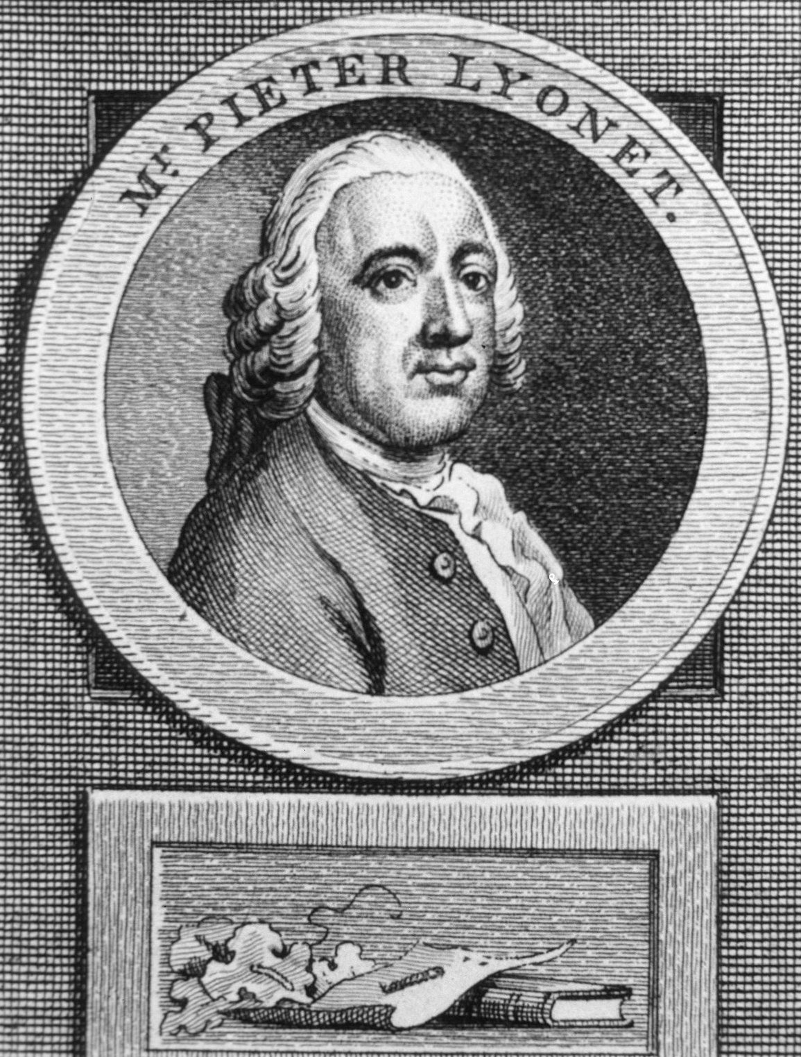 Pierre Lyonnet (1707-1789), Dutch biologist